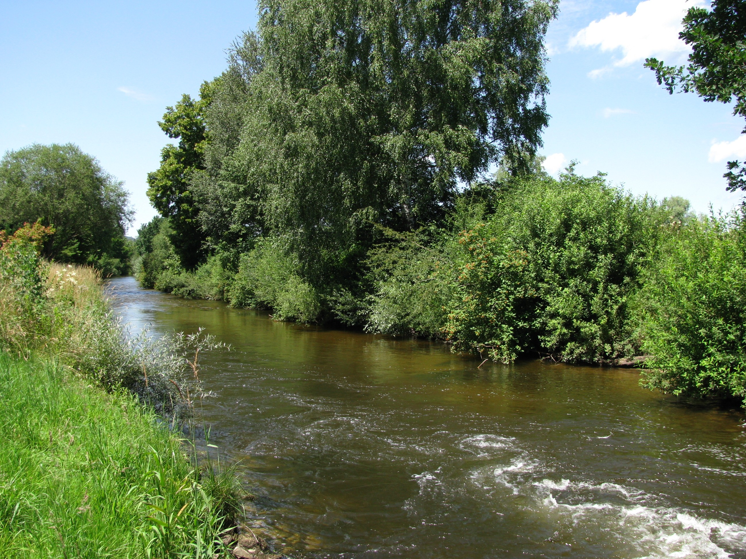 Die Ach bei Maxlried, etwa 1,5 km vor ihrer Mündung in die Ammer.